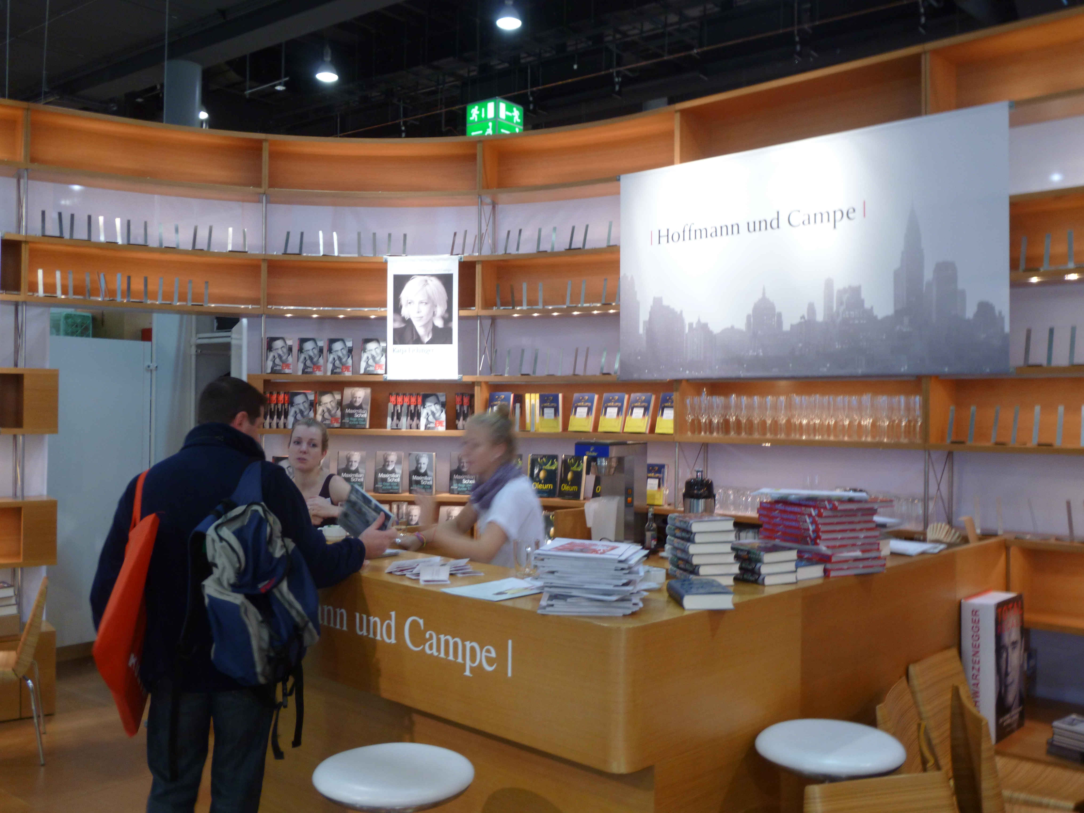 stando de la eldonejo Hoffmann und Campe en la Frankfurta librofoiro 2012